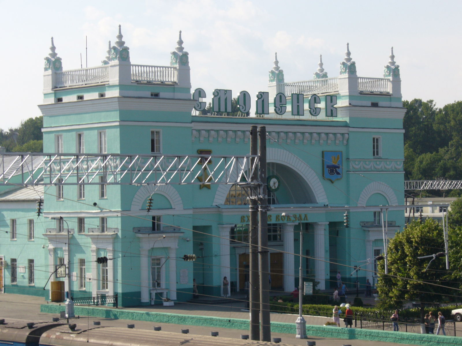 смоленский вокзал новый смоленский вокзал, бирюзового цвета